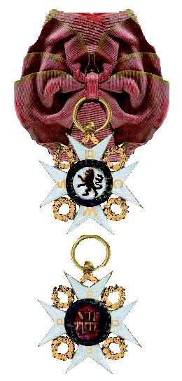 De Orde van de Oude Adel van het Duitse Graafschap Limburg.